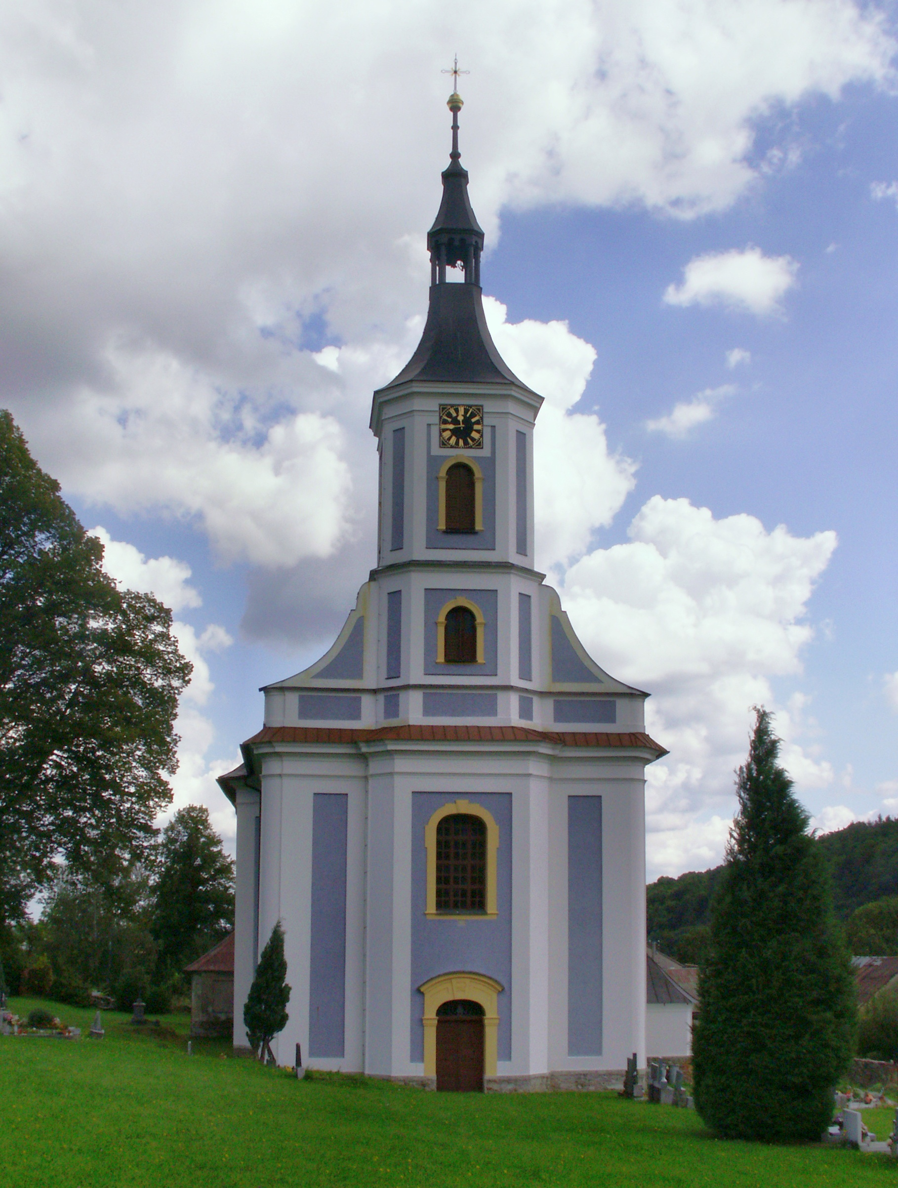 Kostel Nejsvětější Trojice, Janov (okres Bruntál).